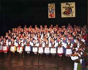 Zespół Pieśni i Tańca Młody Toruń